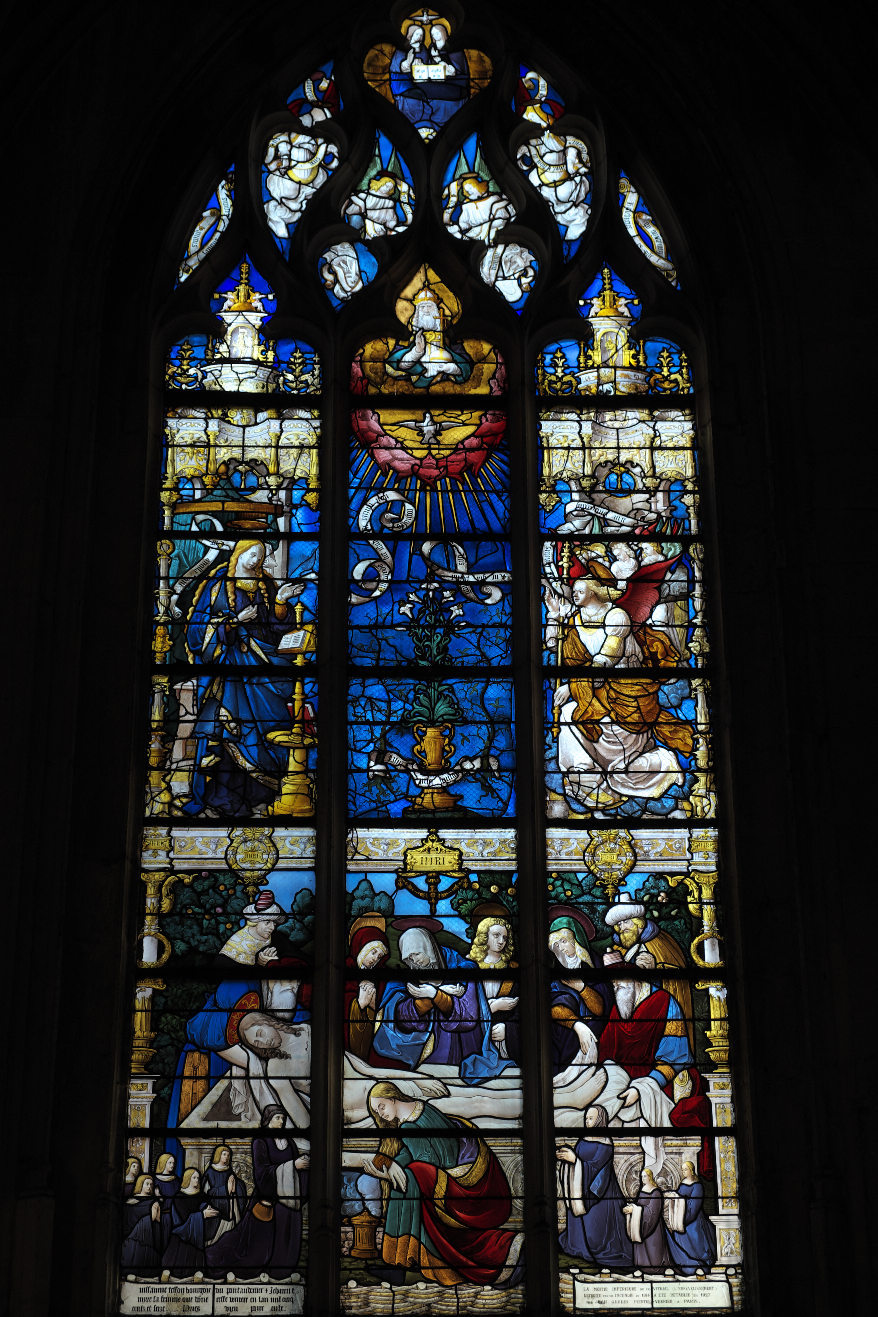 Katholische Kirche Saint-Ouen in Pont-Audemer im Département Eure (Haute-Normandie/Frankreich), Bleiglasfenster aus dem 16. Jahrhundert, Darstellung: Verkündigung; im Maßwerk: Gottvater; untere Scheiben 1927 erneuert (s. Inschrift mit Signatur: JEAN GAUDIN PEINTRE-VERRIER A PARIS) mit der Darstellung der Grablegung